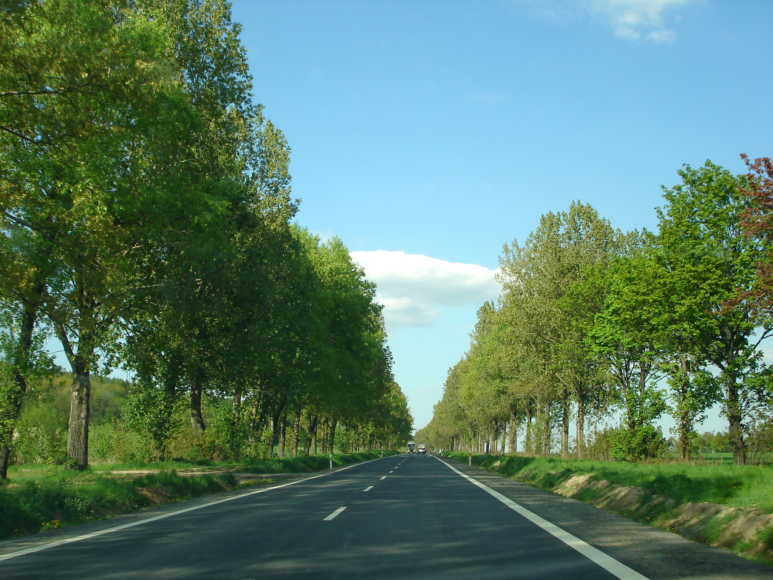 Polen: Europastraße 67 (Droga krajowa 8) bei Bardo in Niederschlesien